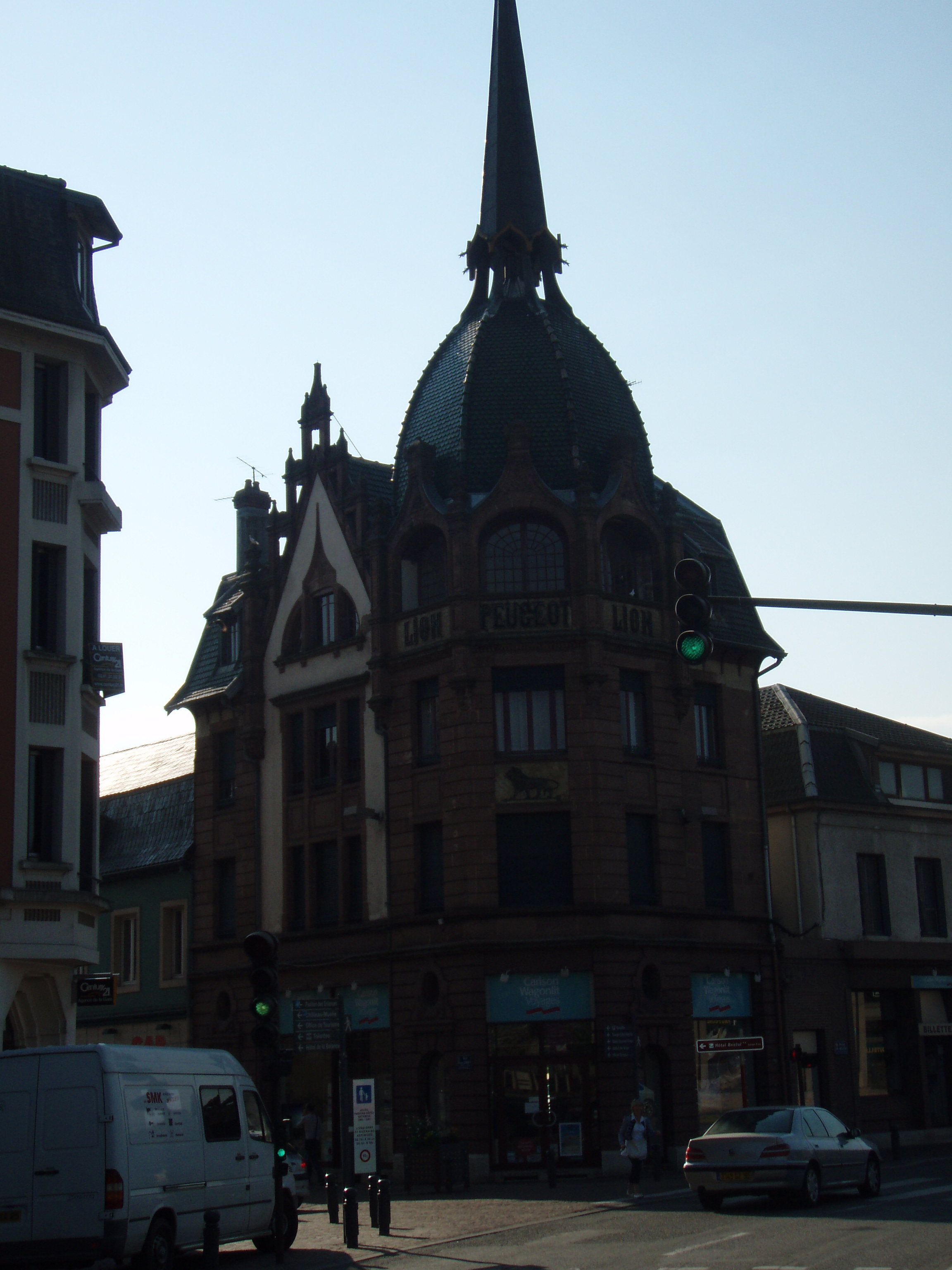 Immeuble dit le lion de Peugeot, Montbéliard, France